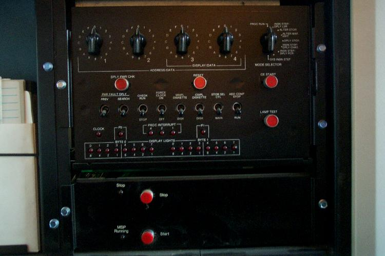 Bildbeschreibung: System /34 Technikerkonsole Quelle: selbst fotografiert Fotograf/Zeichner: Oliver Obi